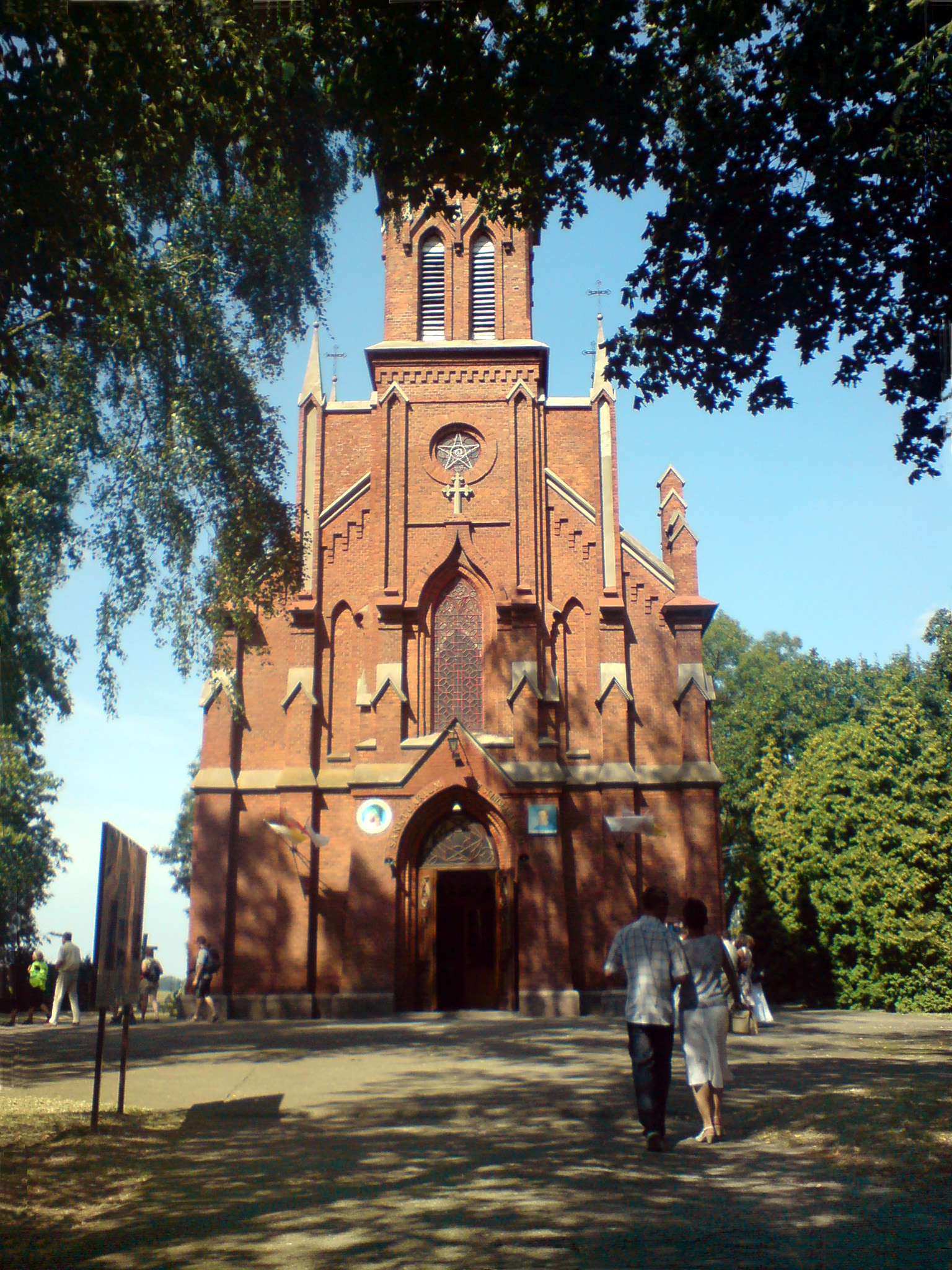 Rostkowo - rzymskokatolicki kościół parafialny p.w. św. Stanisława Kostki. 1895-1900